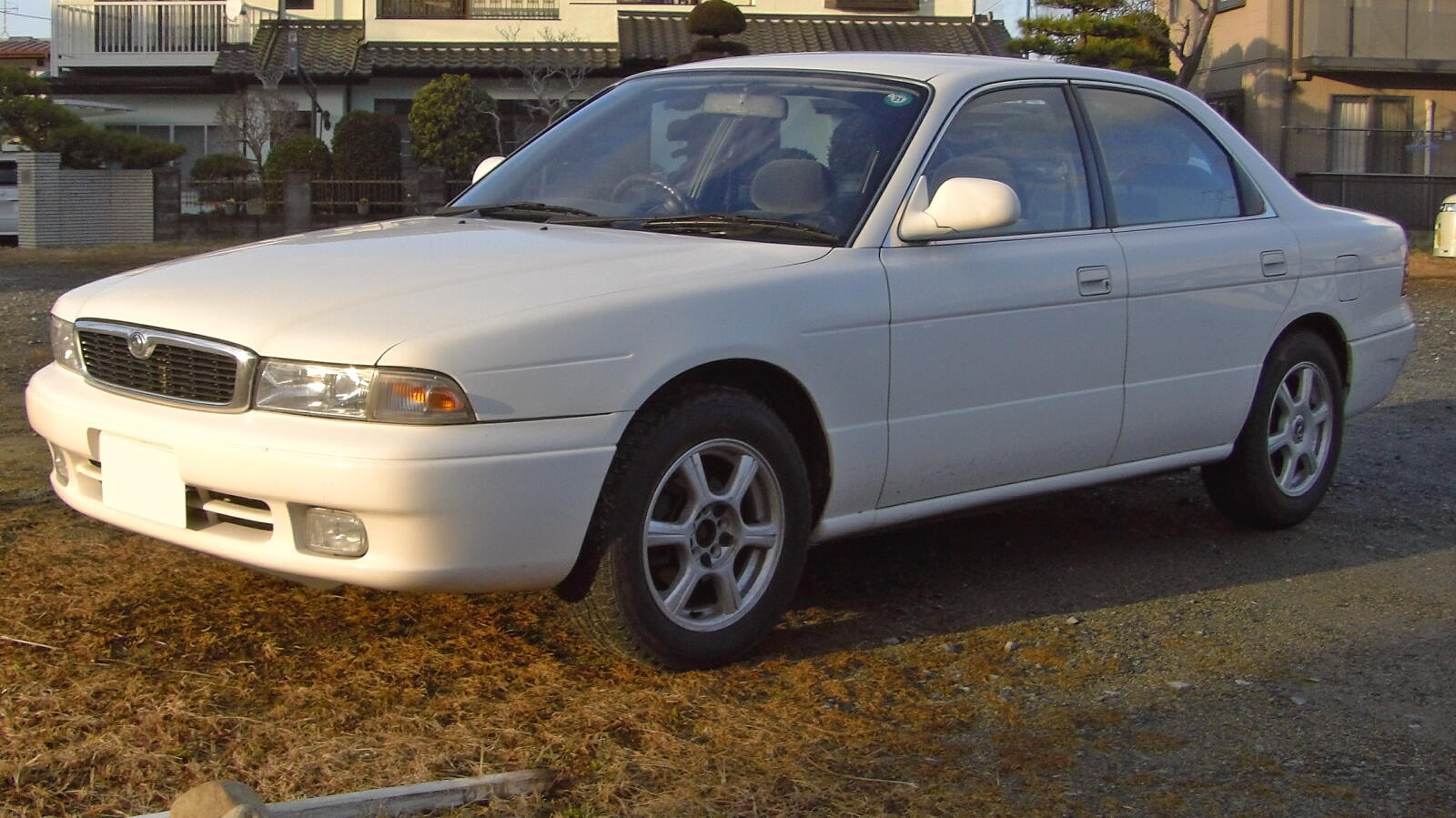 マツダ・カペラ（CG系）